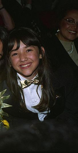 Sherlyn én una conferenza